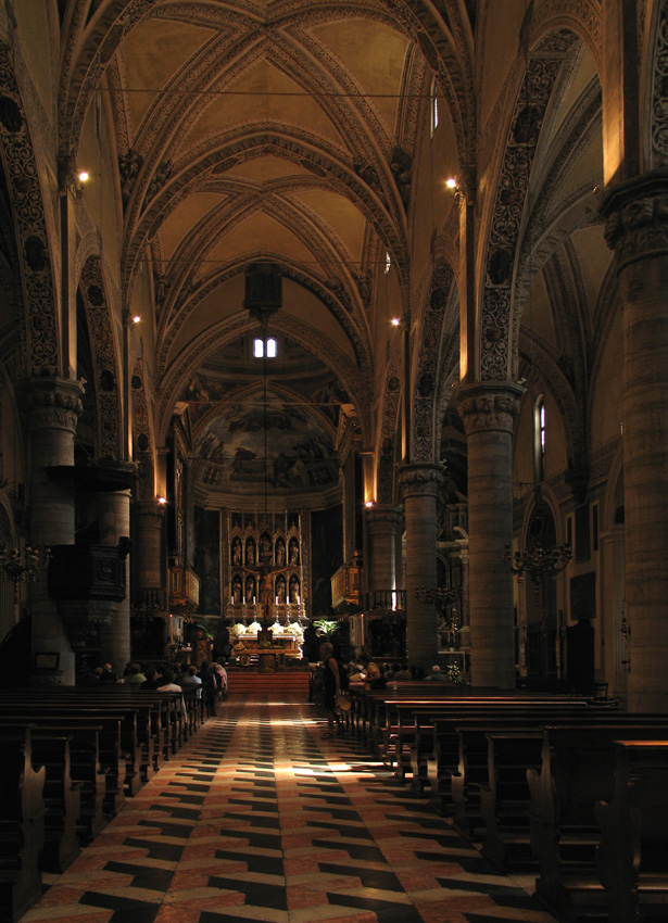 Salo Cathedral, Interior